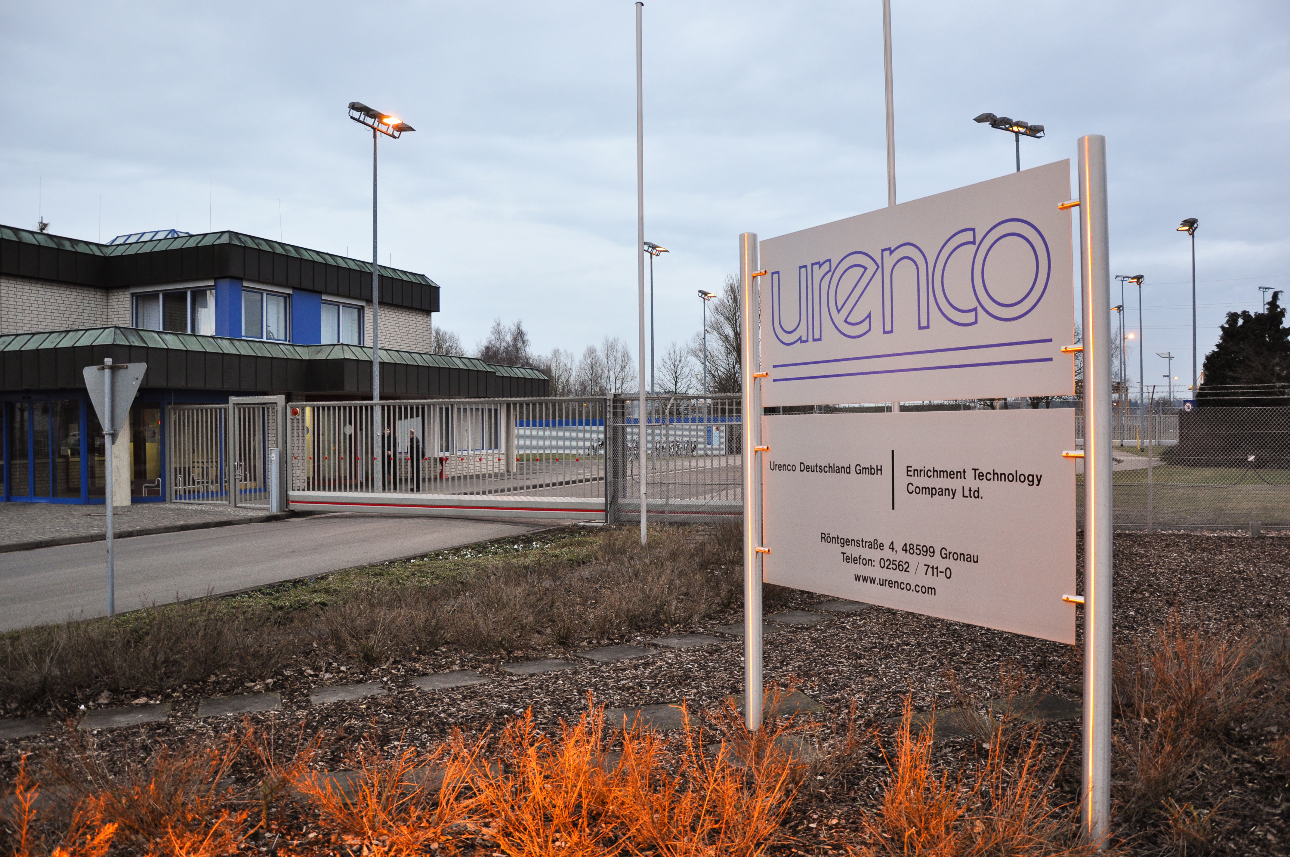 Haupttor mit Pforte der Anlage